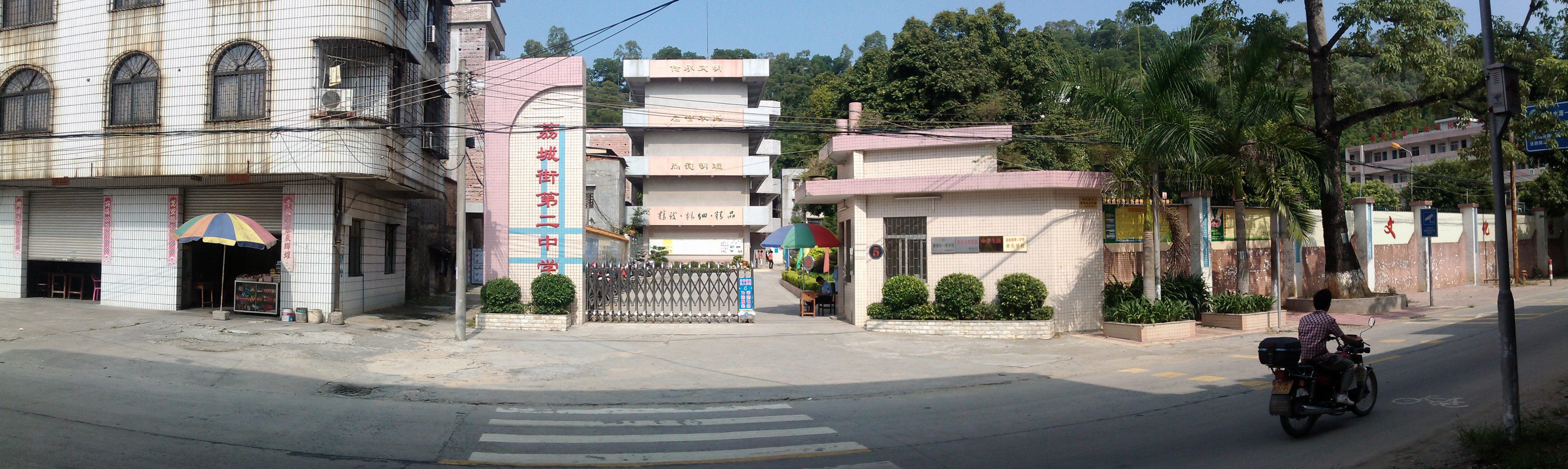 荔城二中大门